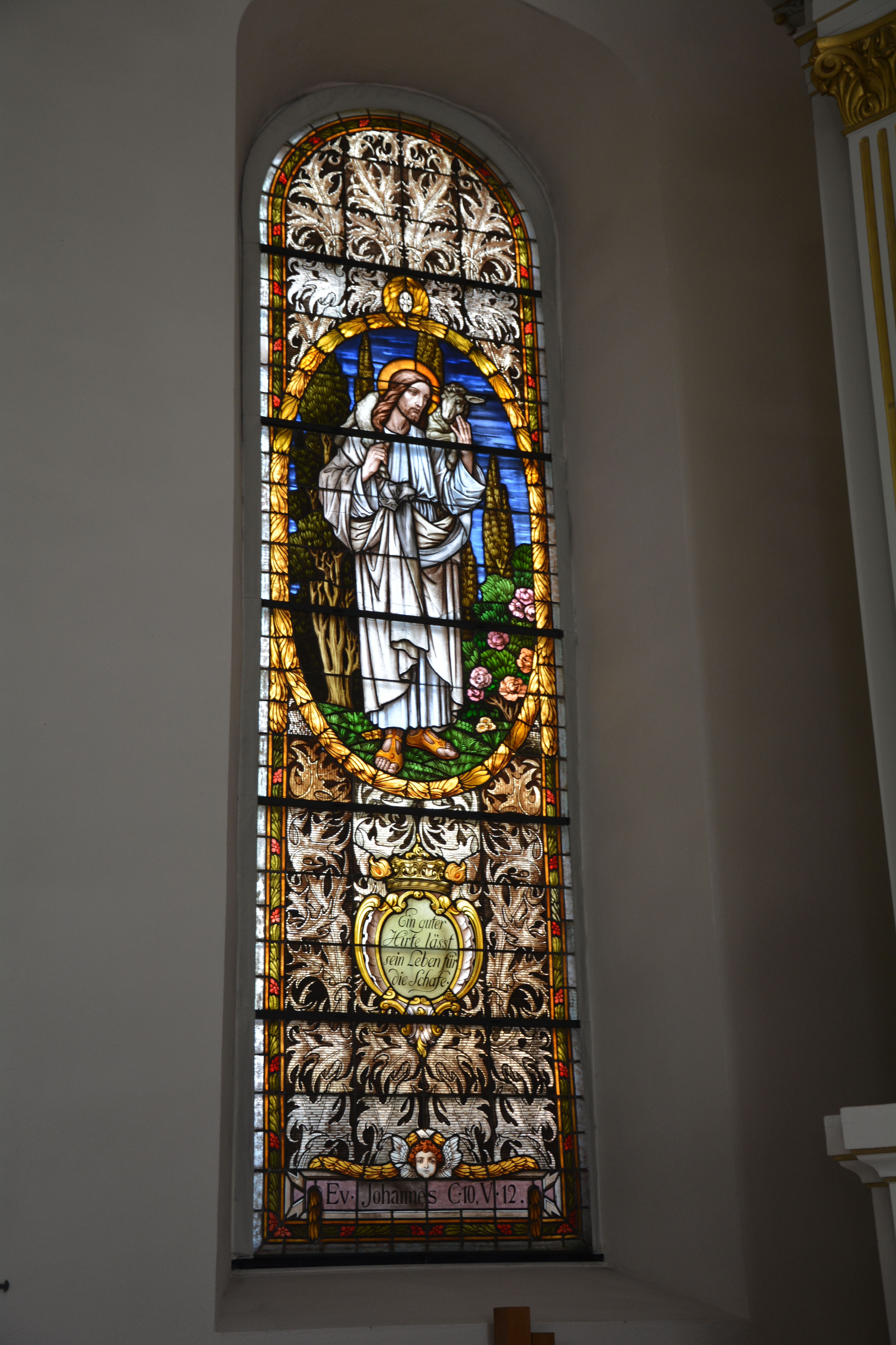 Dresden-Hosterwitz: Kirche Maria am Wasser im Juli 2018. Altarfenster